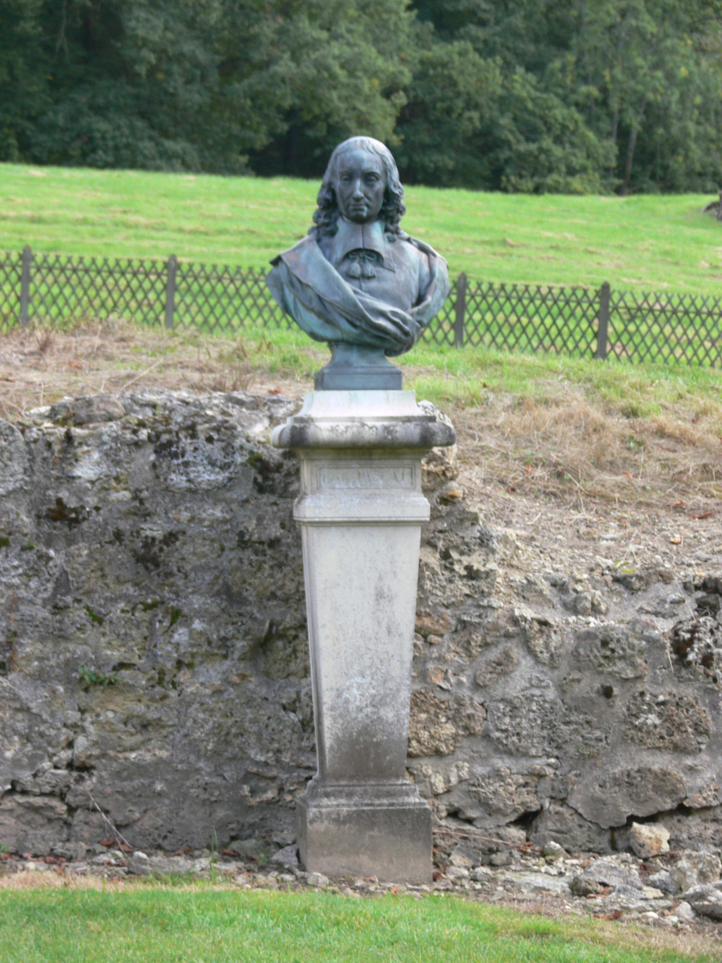 Port-Royal-des-Champs This building is en partie classé, en partie inscrit au titre des Monuments Historiques. .